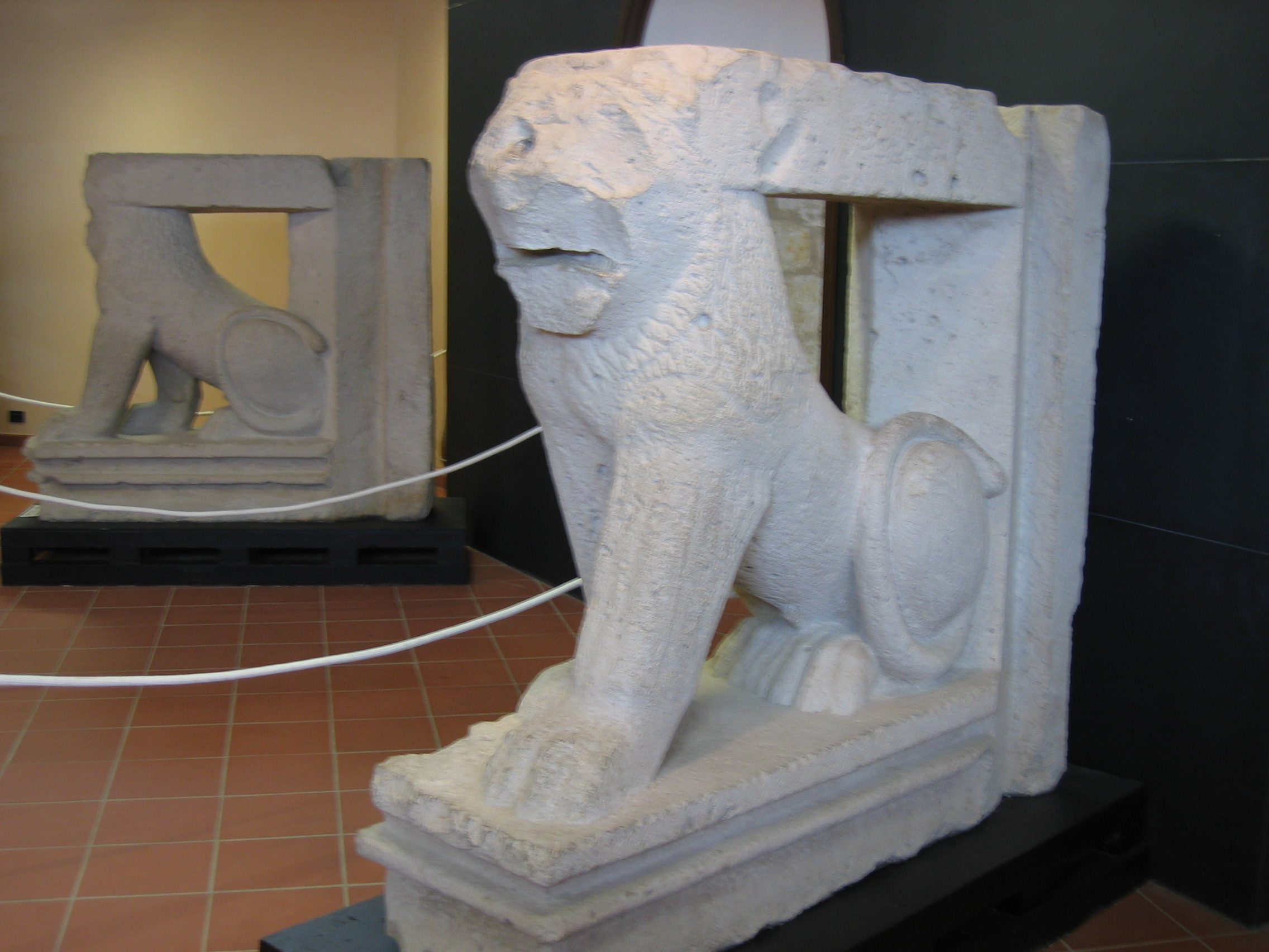 Leone di pietra